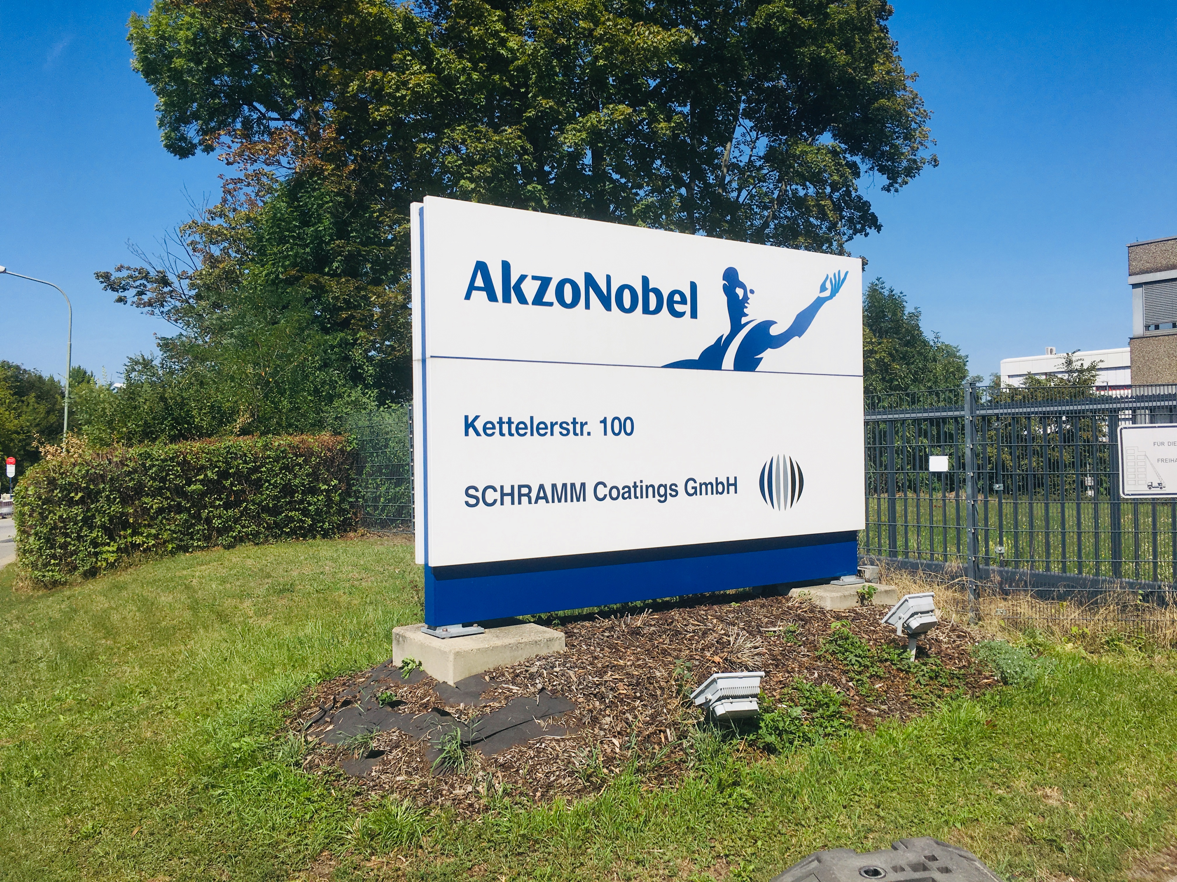 Firmenstandort AkzoNobel in Offenbach am Main